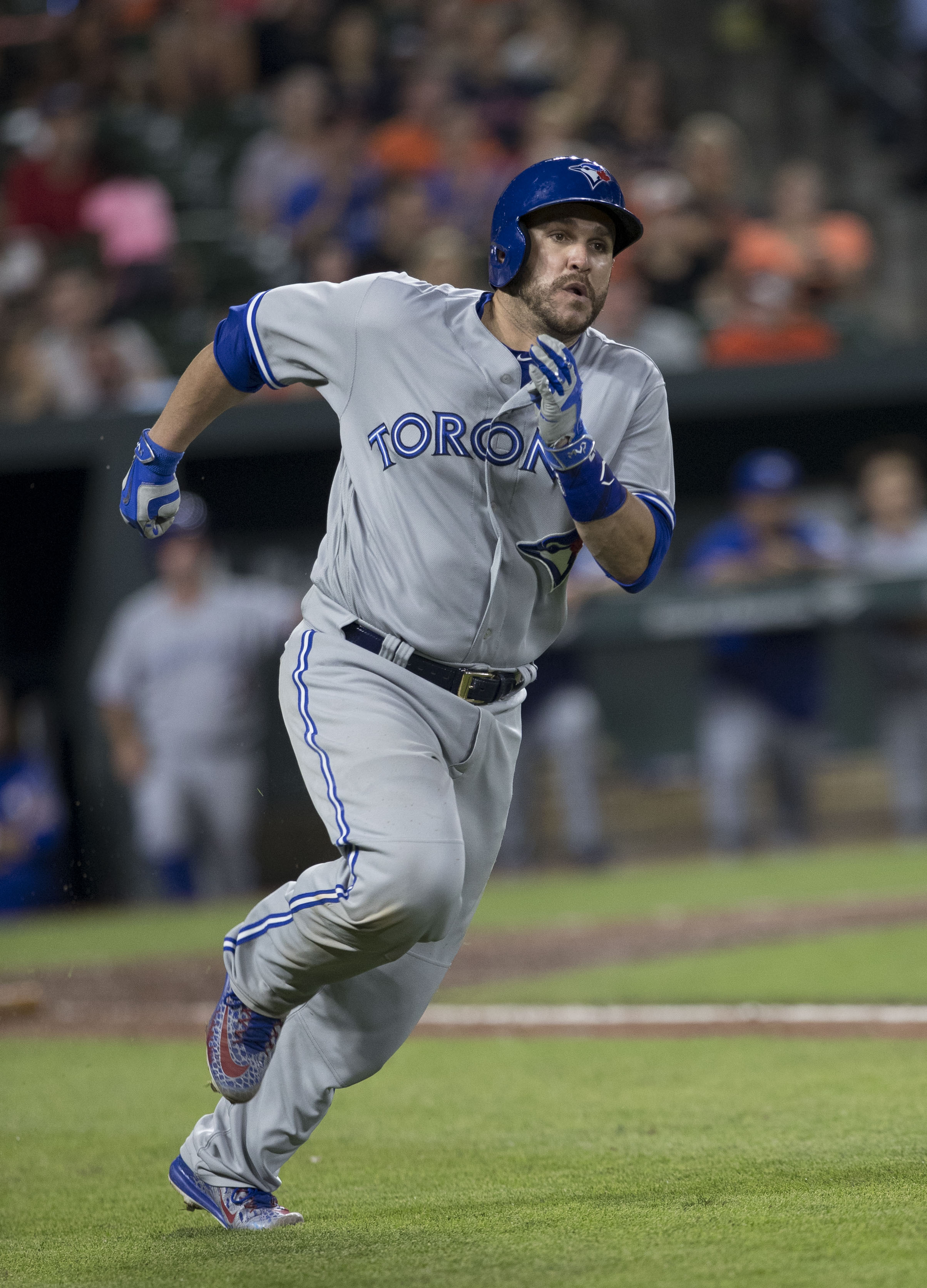 Blue Jays at Orioles 8/31/17